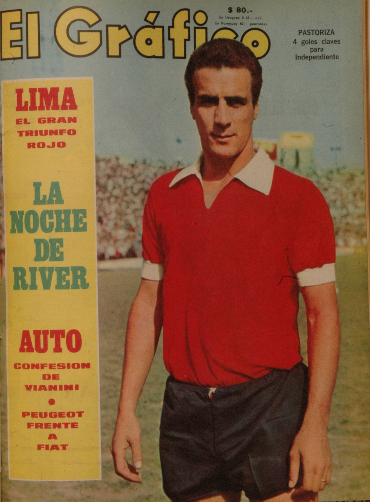 El Grafico del 26 de Marzo de 1968. Edicion 2529